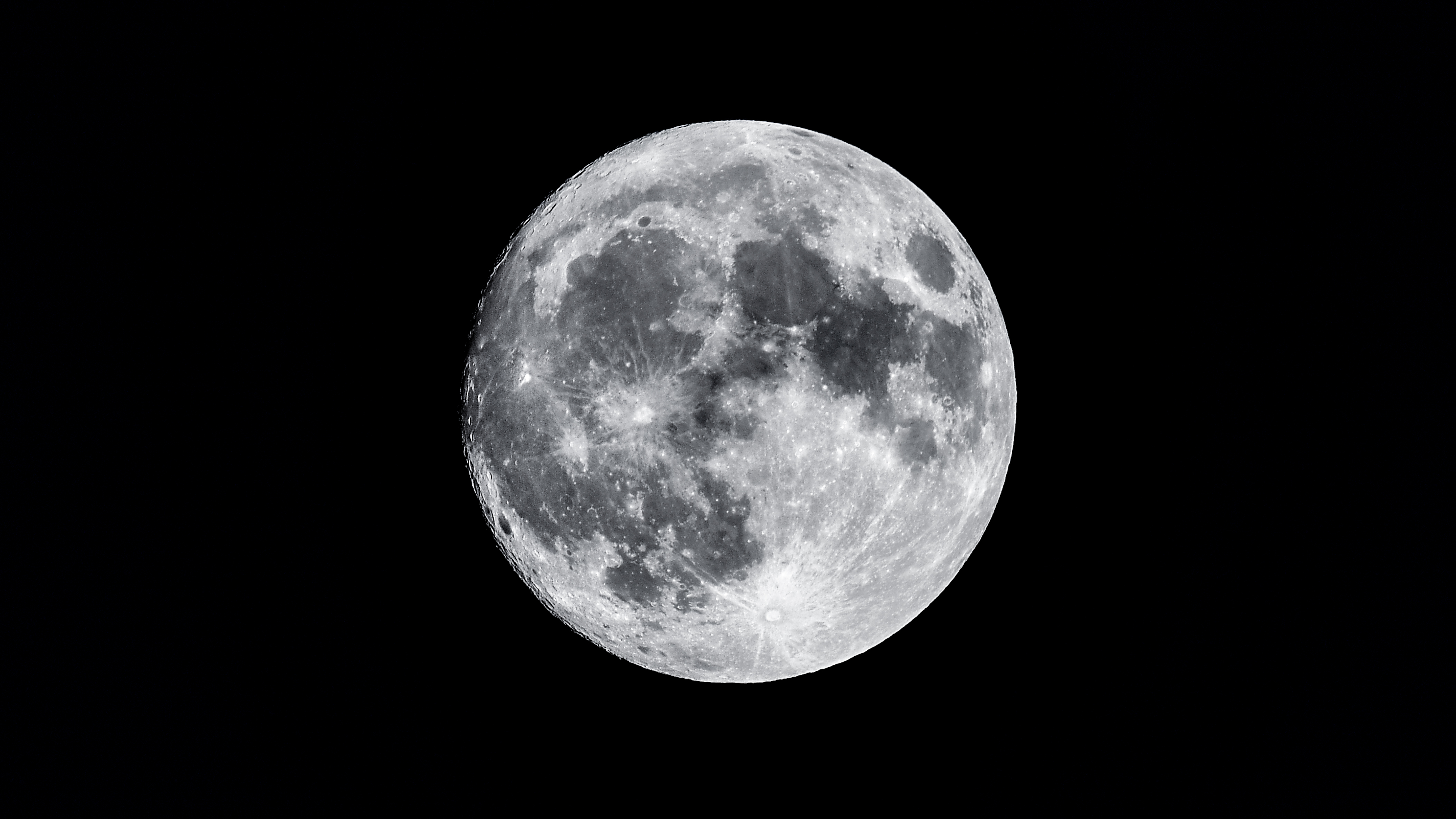 11/14/2016 Supermoon in London eye.